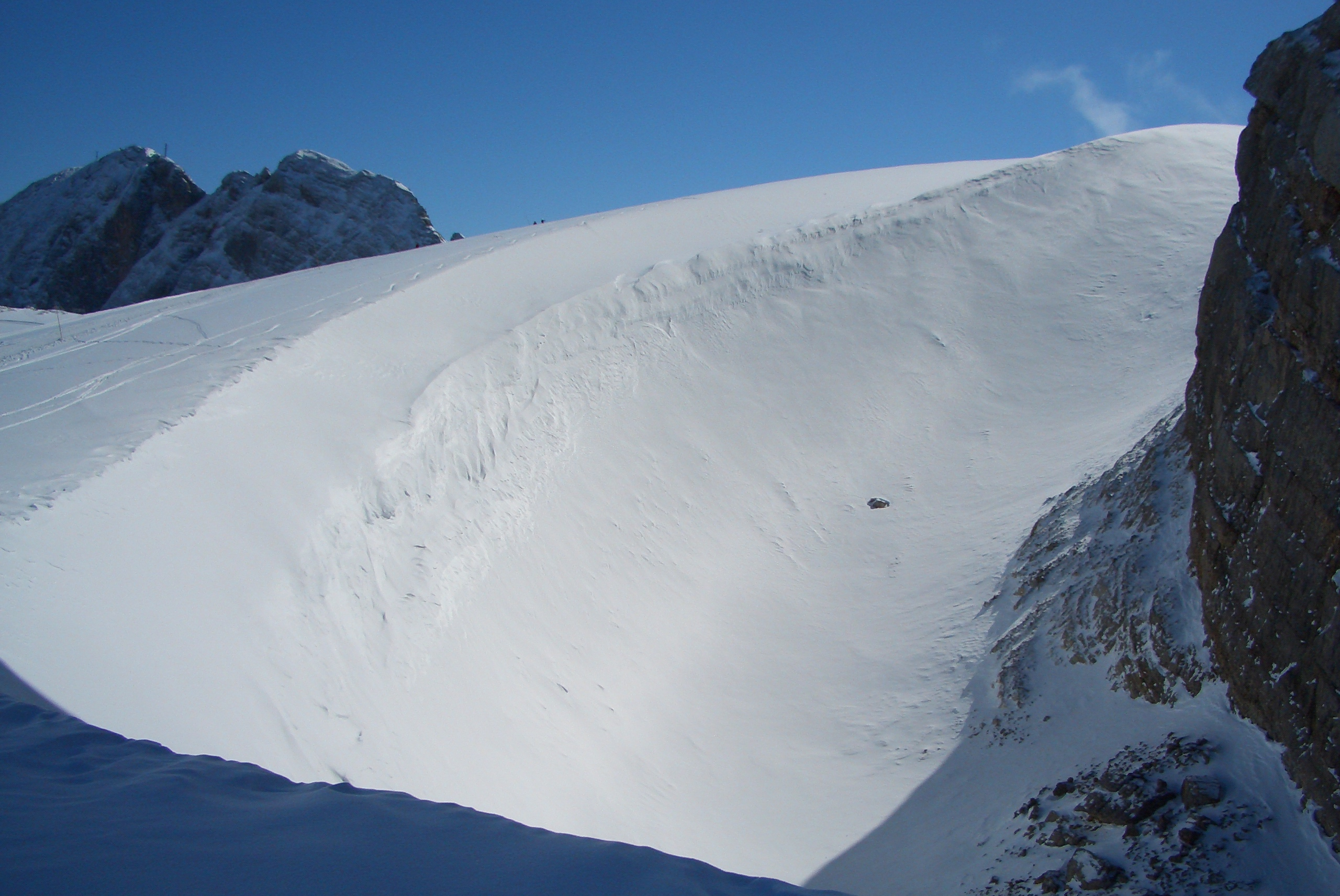 Dirndlkolk im Hallstaetter Gletscher